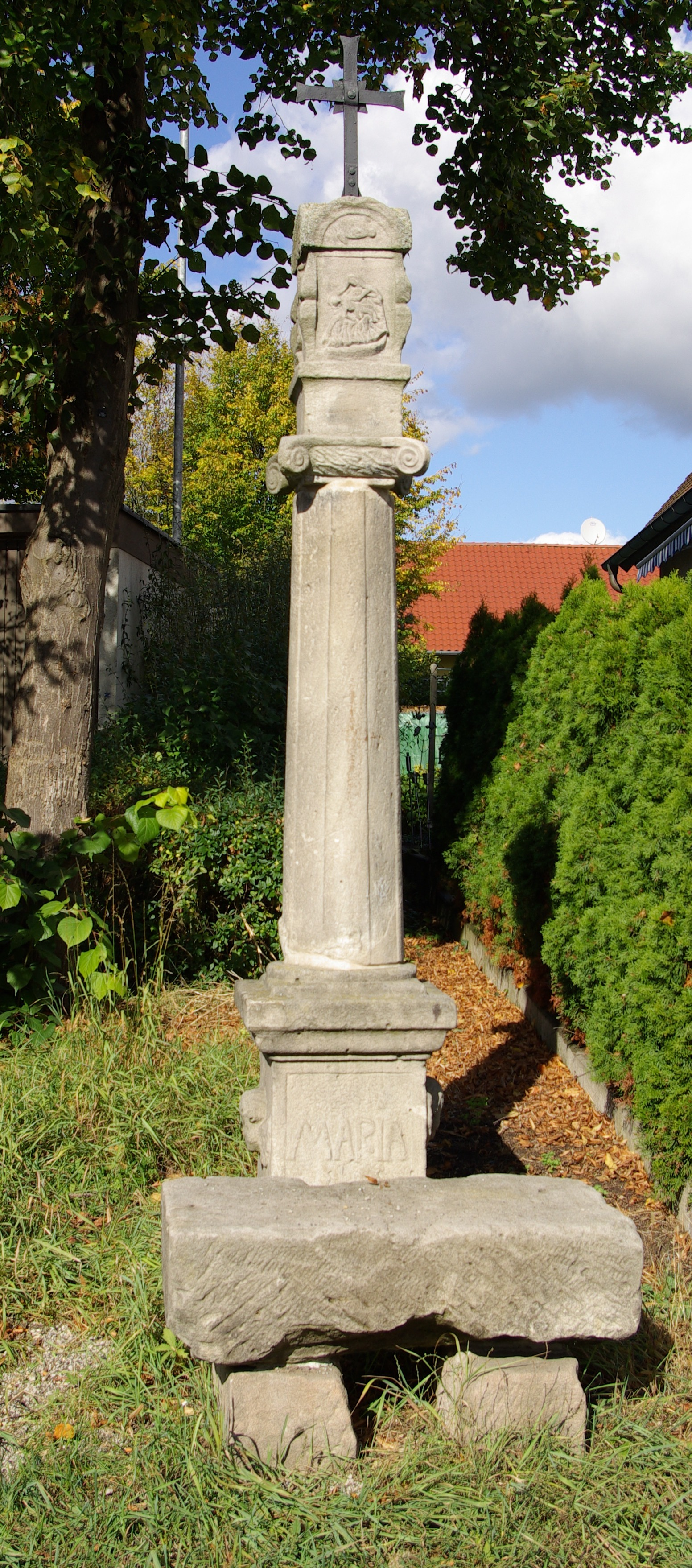 Bildstock mit Ruhebank im Erlanger Stadtteil Häusling